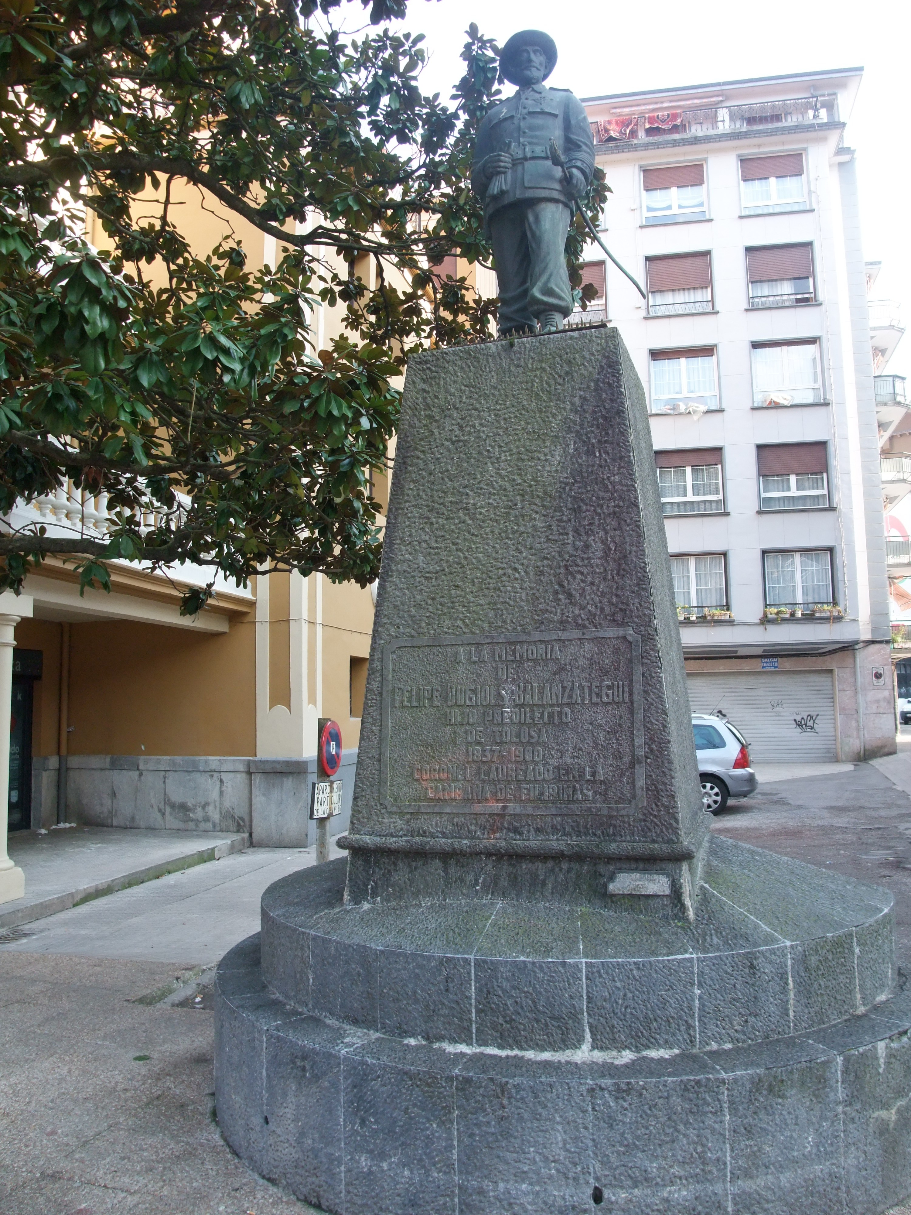 Tolosa (Guipúzcoa)-Paseo de San Francisco-Monumento a Felipe Dugiols Balanzategui, coronel en la Guerra de Filipinas (Juan Lope, 1976)